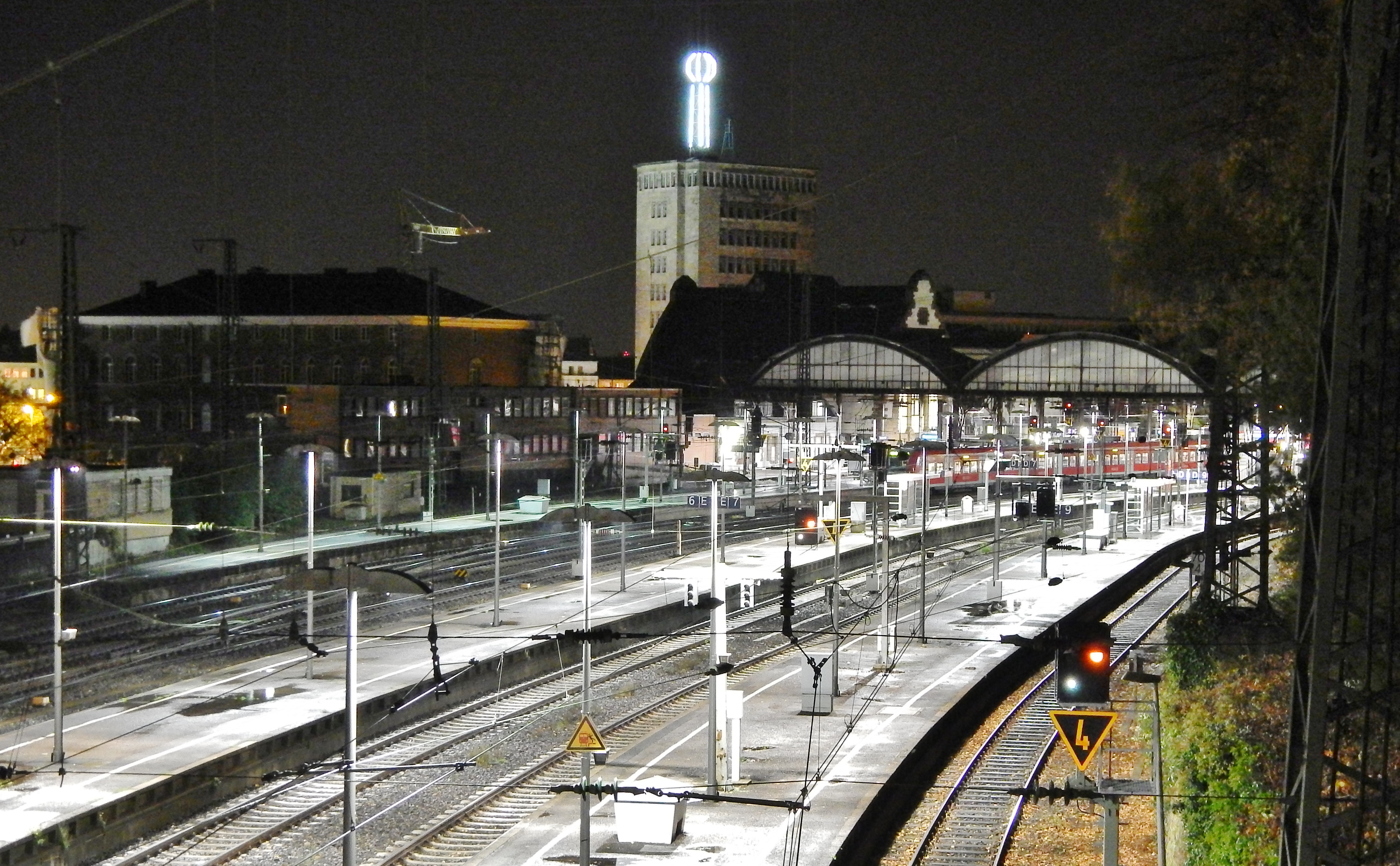 Die Aachener Wettersäule am Hauptbahnhof Aachen